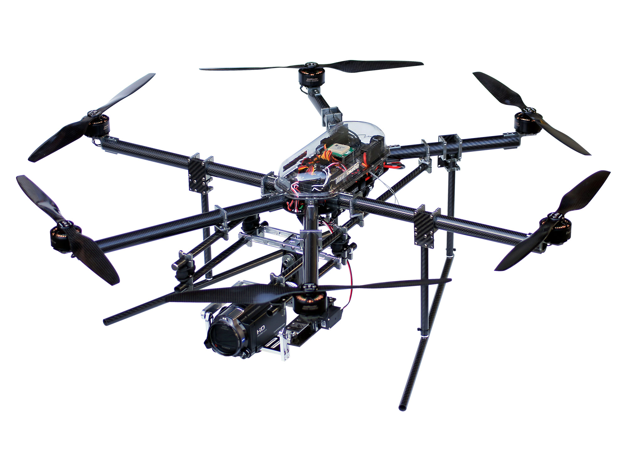 エンルート製のマルチコプターZionPro800。空撮用マルチコプター（ヘキサコプター）として開発された機体